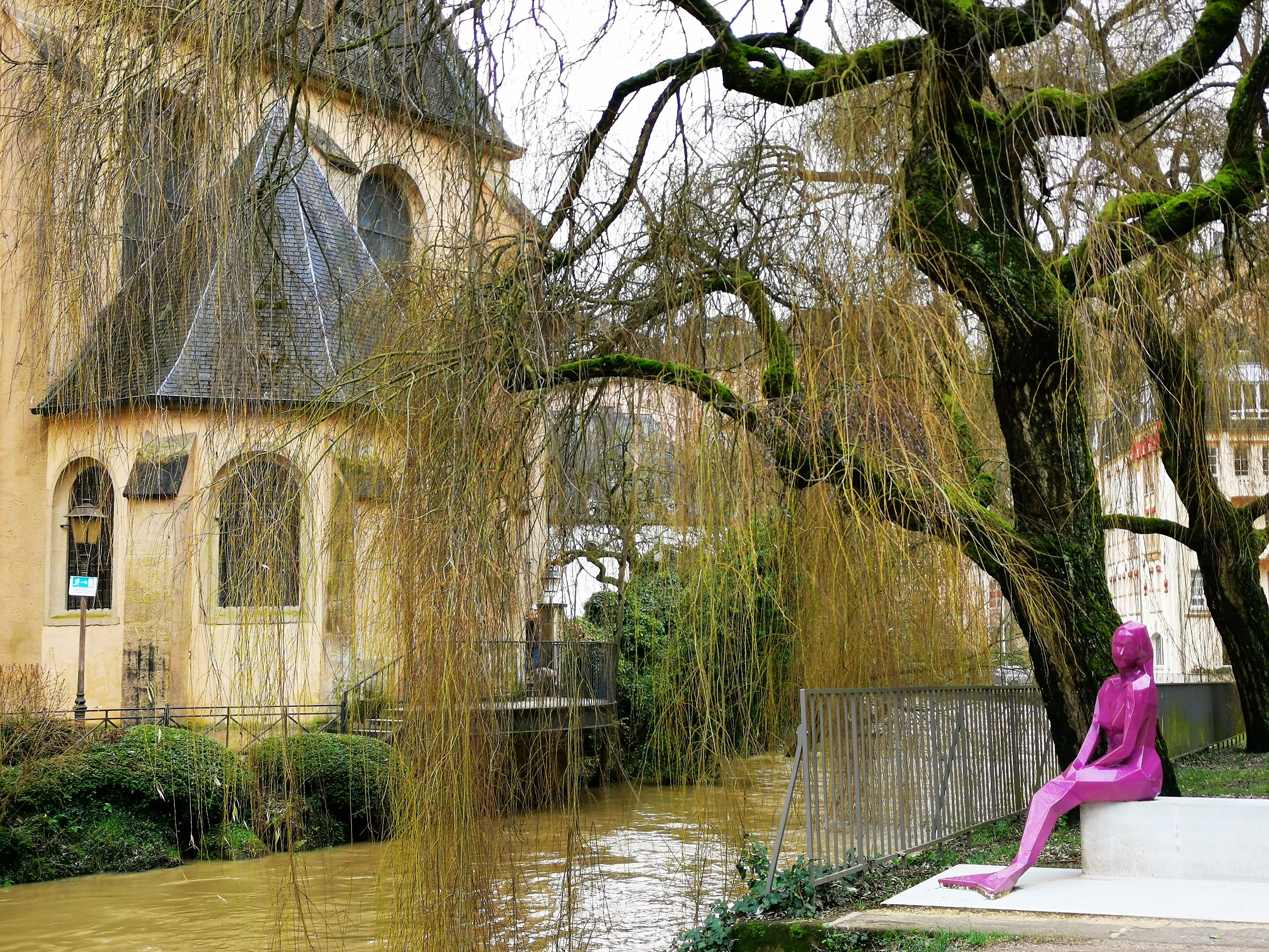 Luxembourg-Grund. L'Alzette après des pluies abondantes. À l'arrière plan, l'église Saint-Jean de Neumünster. À droite, sculpture "Melusina" de Serge Ecker.